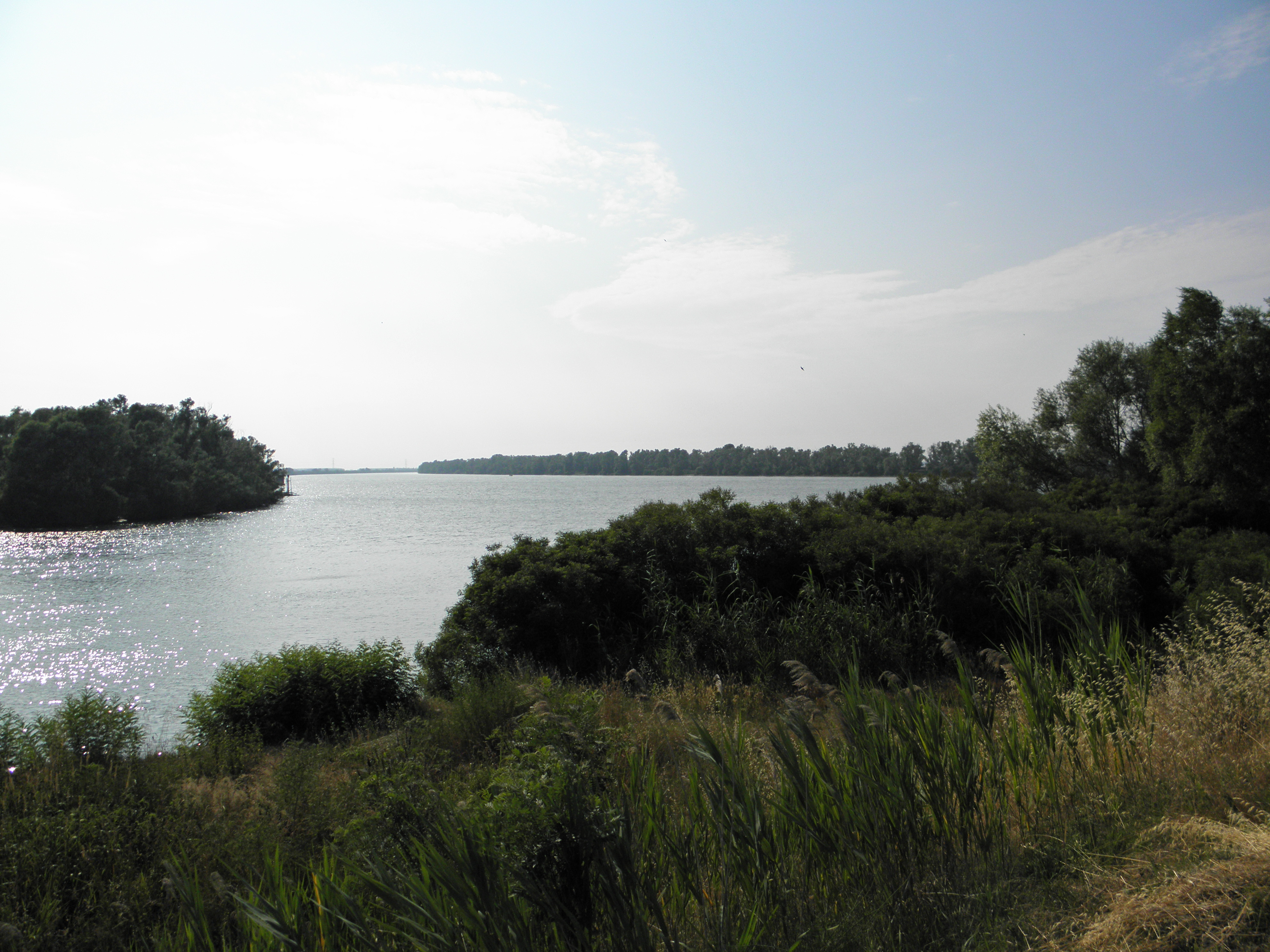 Porto Tolle: il Po di Gnocca in prossimità della sua diramazione dall'alveo principale (Po di Venezia).